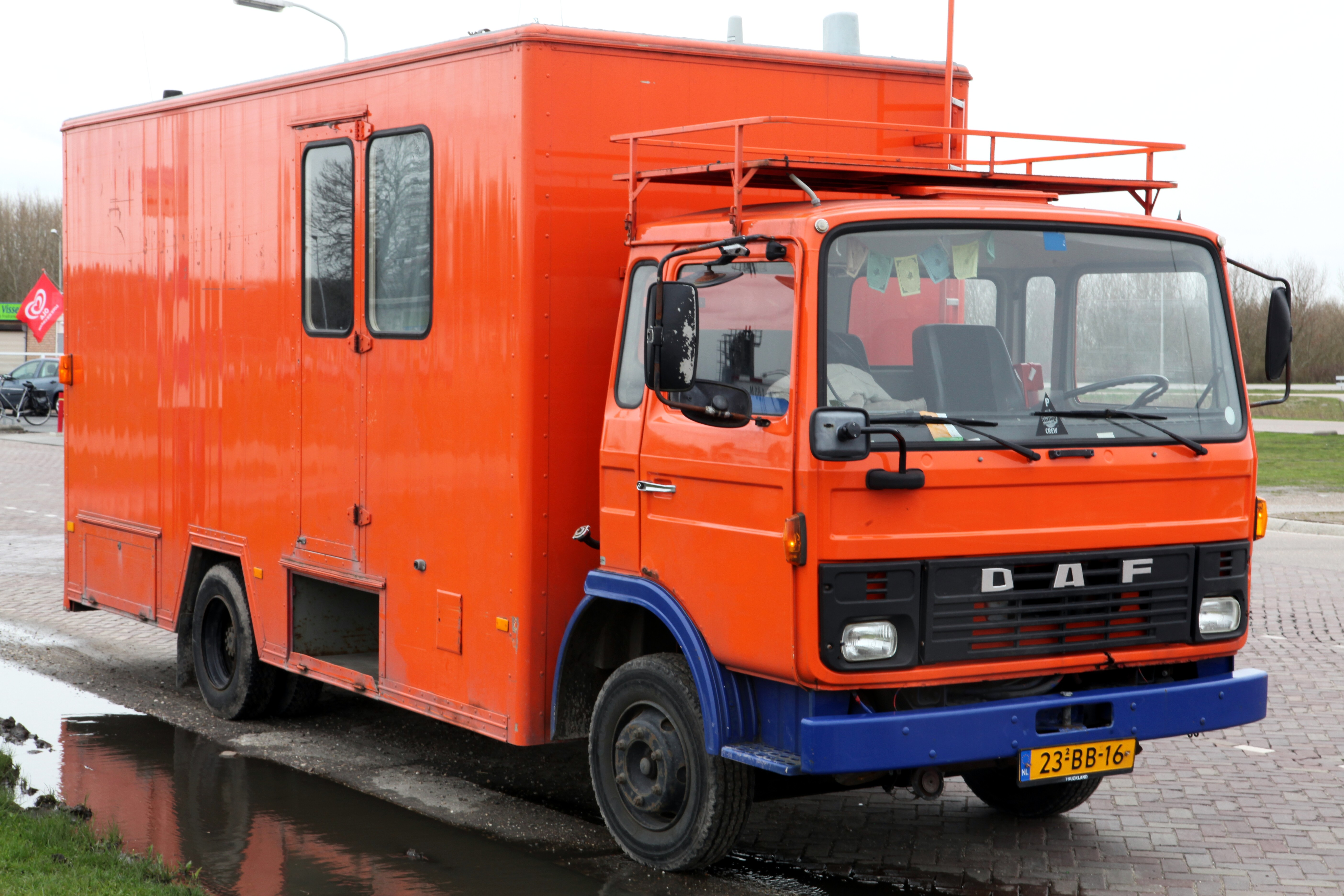 Daf FA 900